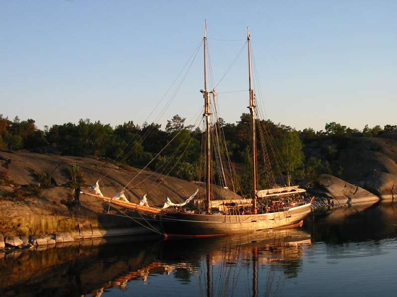 Bild på skonaren Ellen